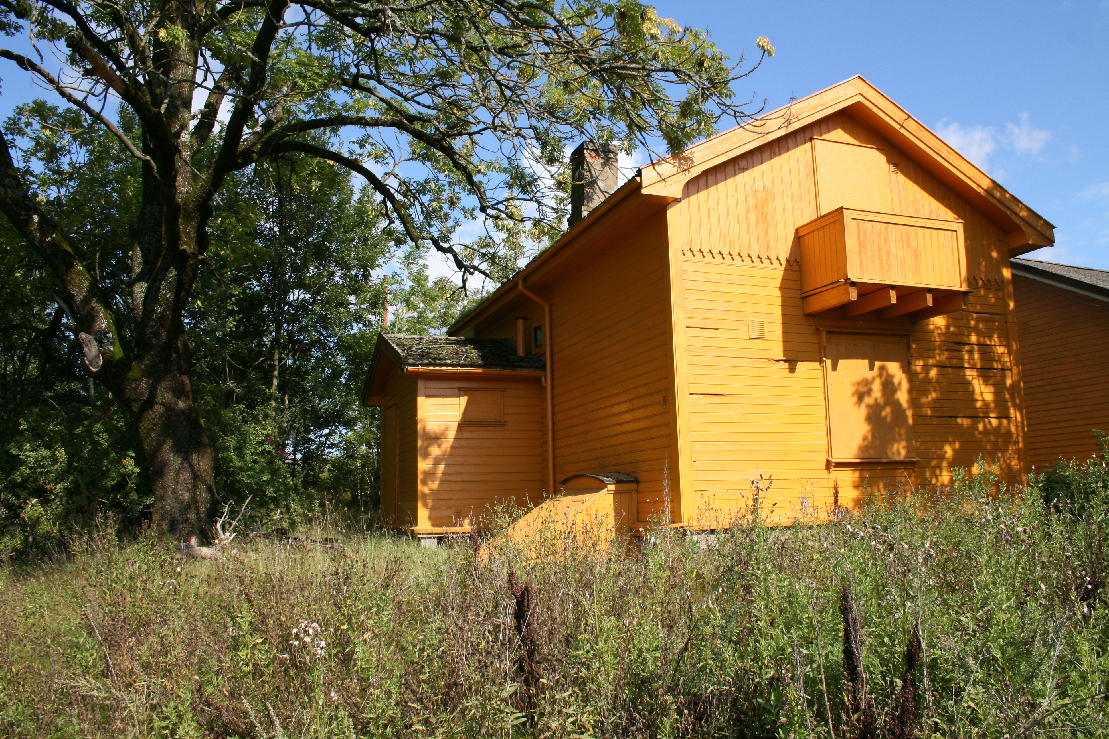 Stasjonsbygningen på gamle Holstad stasjon 2008.